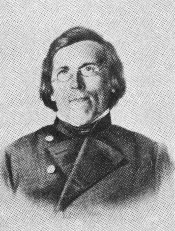 François (Franz) Müller, 1813-1866